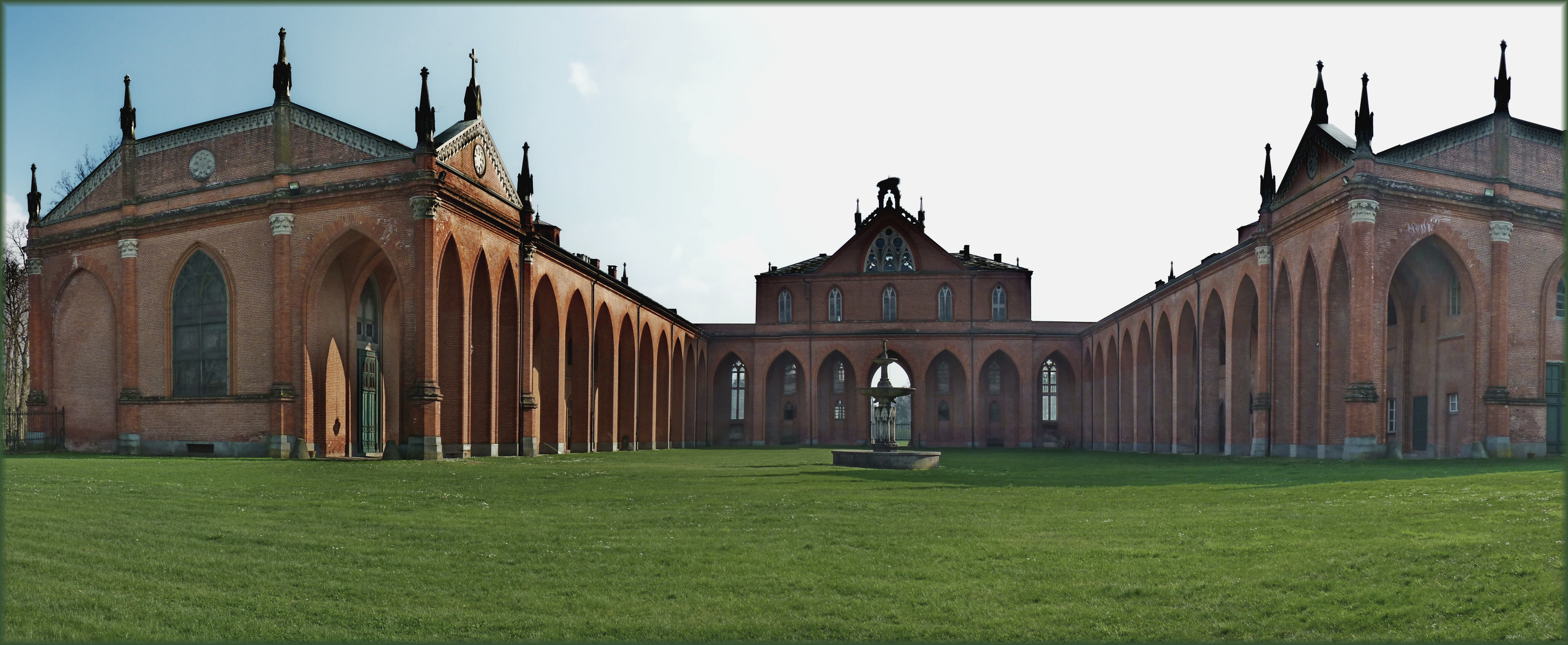 la Margaria